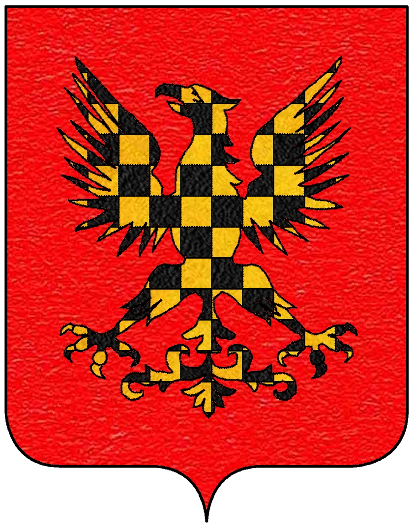 Stemma della famiglia Conti